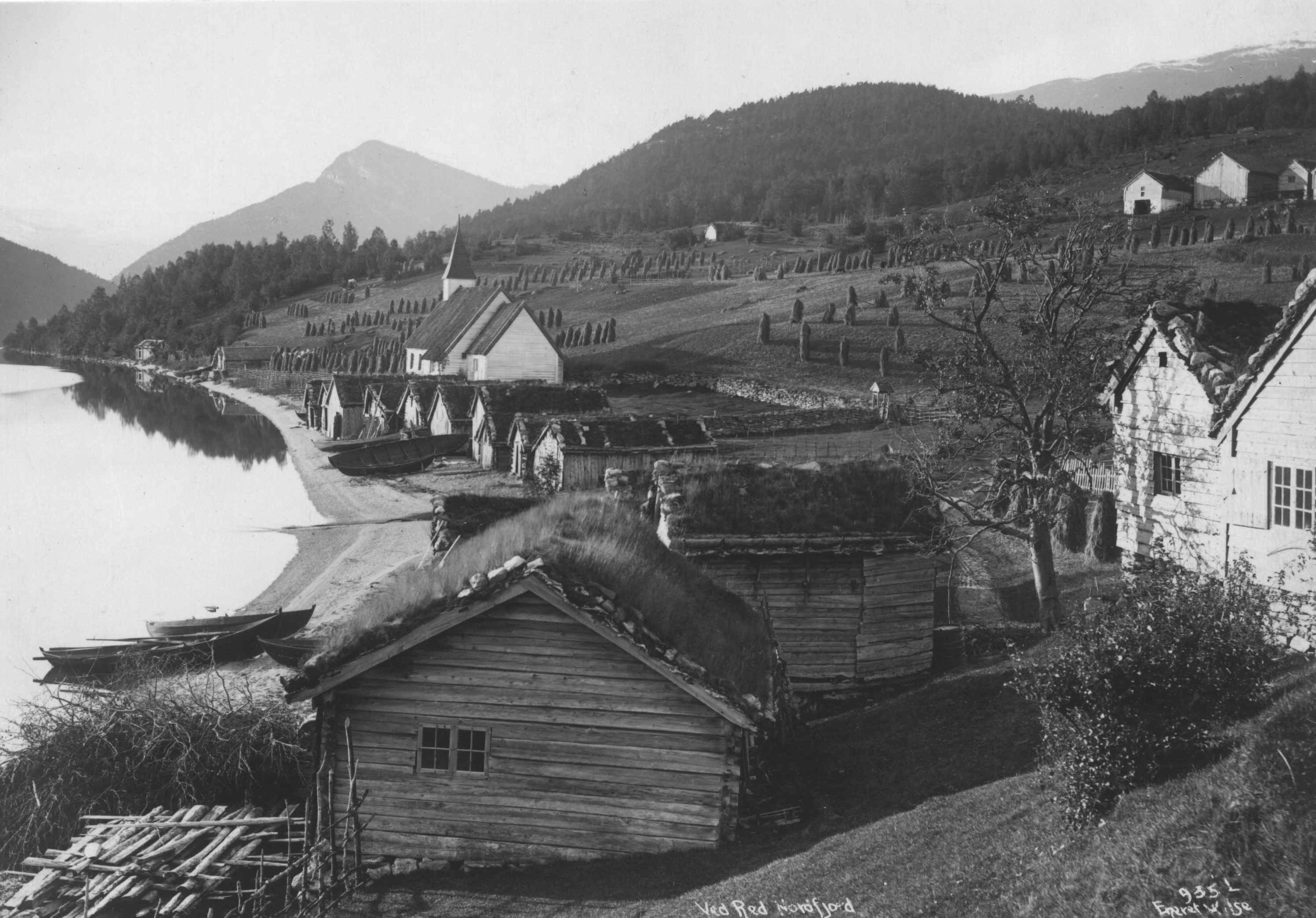 Breim gamle kirke på Reed i Gloppen. Foto: Anders Beer Wilse, Fra Norsk folkemuseums fotosamling i Digitalt museum. Inventarnummer: NF.09200-002.